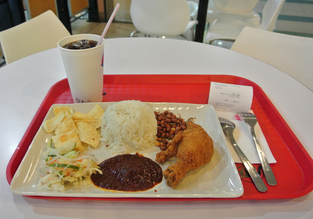 マレーシアのナシ・レマ・アヤム。ジョホールバルのマリーブラウンにて。商品名はナシ・マリーブラウン